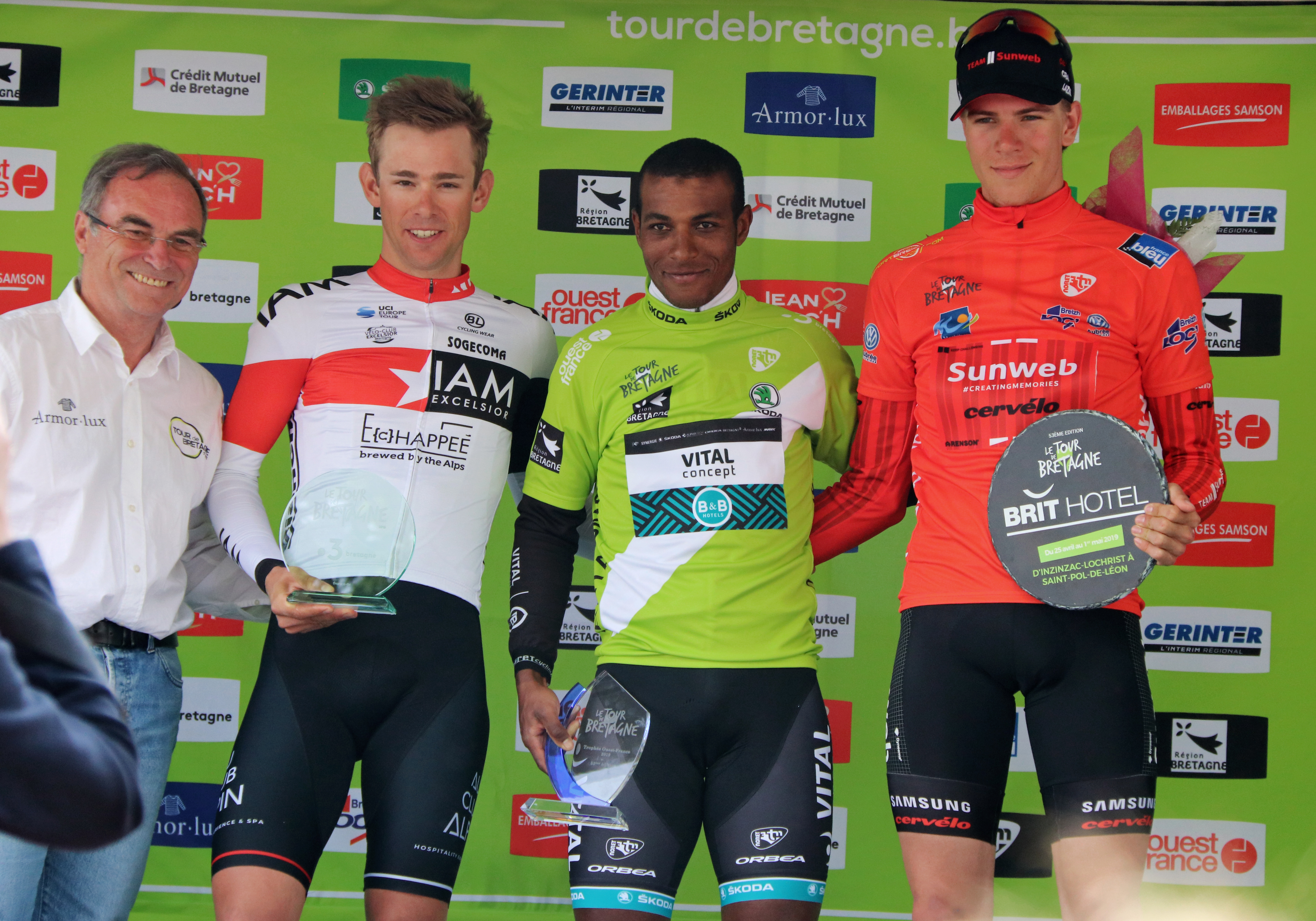 Classement général : Fabian LIENHARD (3e), Lorrenzo MANZIN (1er) et Nils EEKHOFF (2e). Podium d'arrivée à Saint-Pol-de-Léon le 1er mai 2019, en présence de Bernard Hinault.